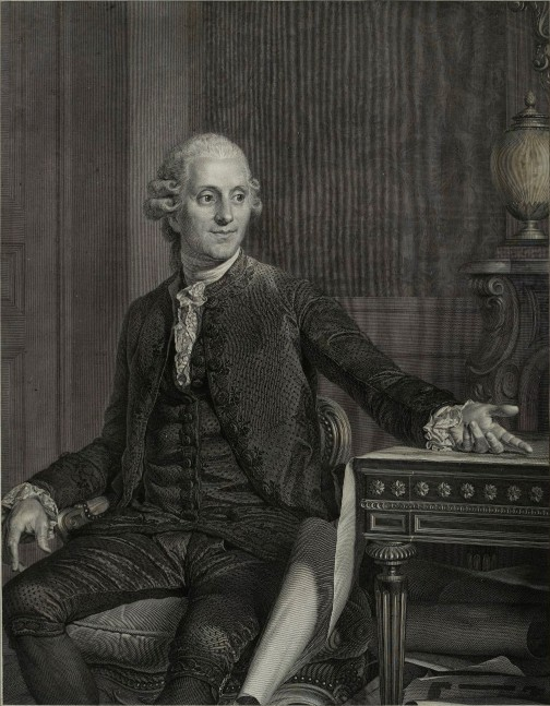 Gravure de Gabriel Sénac de Meihan en 1783, par Charles Bervic d'après la peinture de Joseph-Siffrein Duplessis.